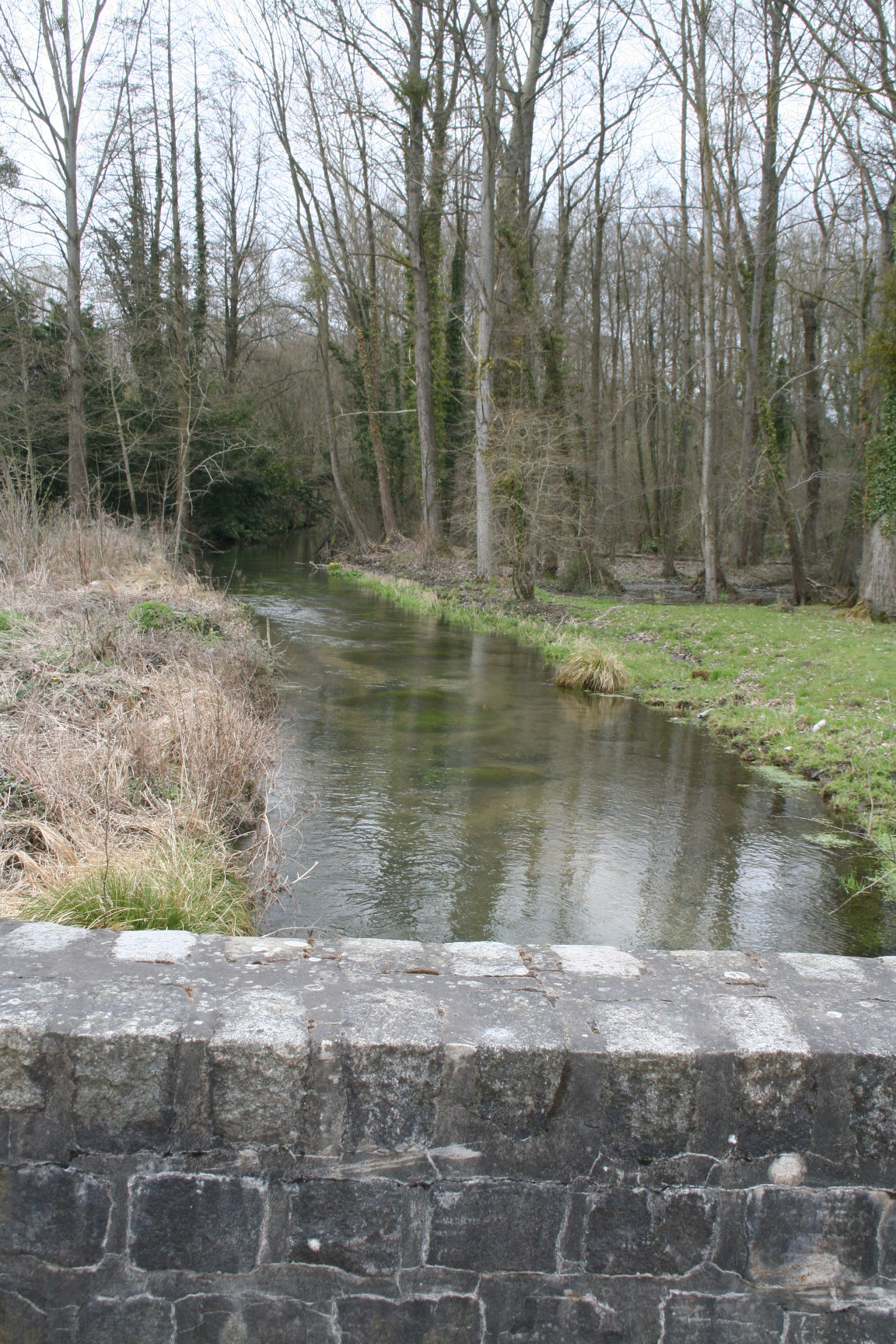 Picard: Ech rio L'échaut à Pont-d'Grès (Cotinchy, Sonme, Picardie)